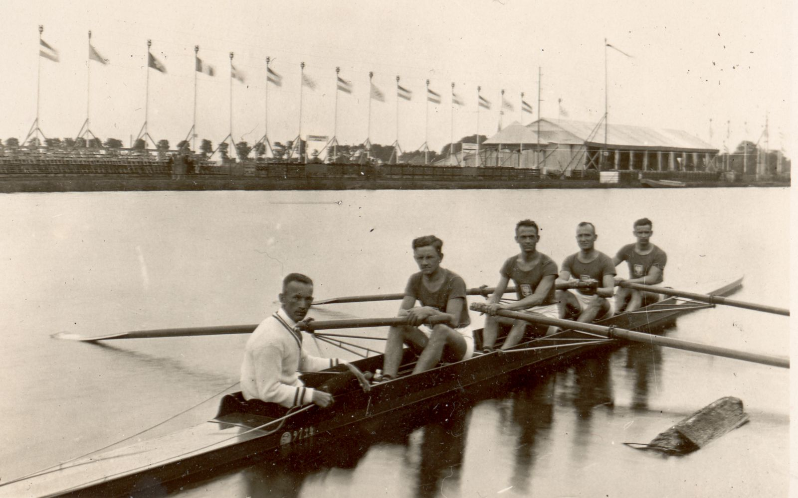 Czwórka ze sternikiem: Franciszek Bronikowski, Edmund Jankowski, Leon Birkholc, Bernard Ormanowski, Bolesław Drewek (sternik) podczas Igrzysk Olimpijskich w Amsterdamie. Brązowi medaliści, zawodnicy BTW Bydgoszcz.